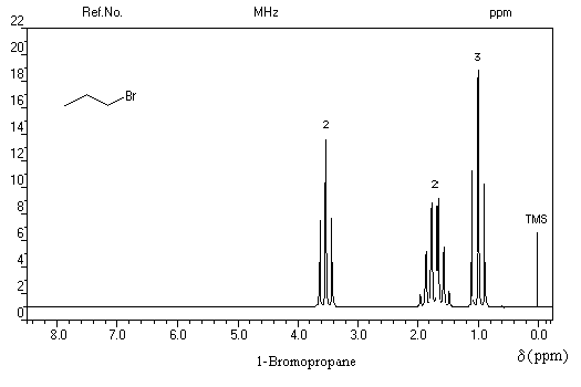 1-bromopropane NMR spectrum